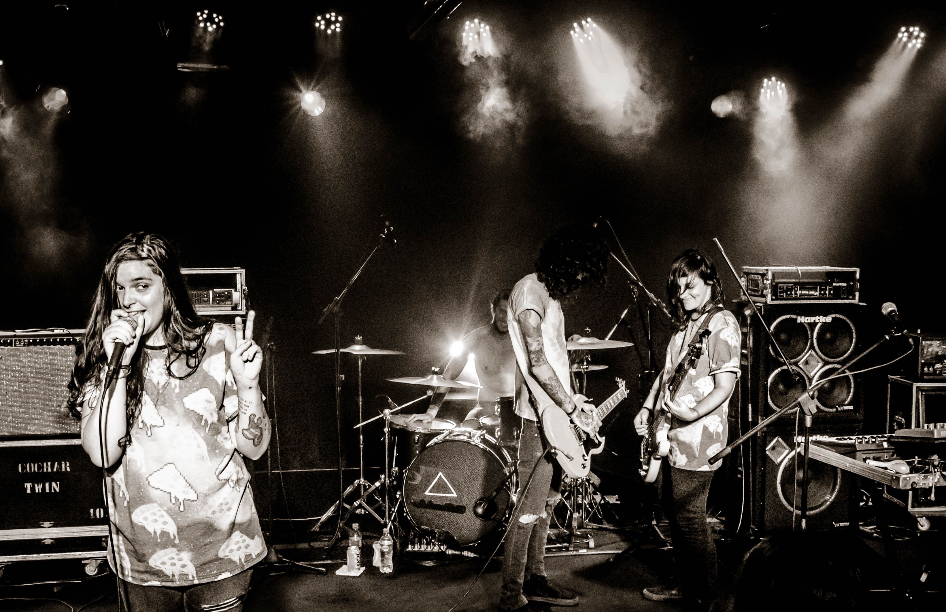 Show no Sesc Thermas em Presidente Prudente/SP